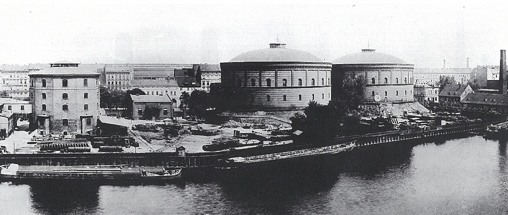 Städtische Gasanstalt Stralauer Platz um 1900, vom Westufer der Spree aus gesehen